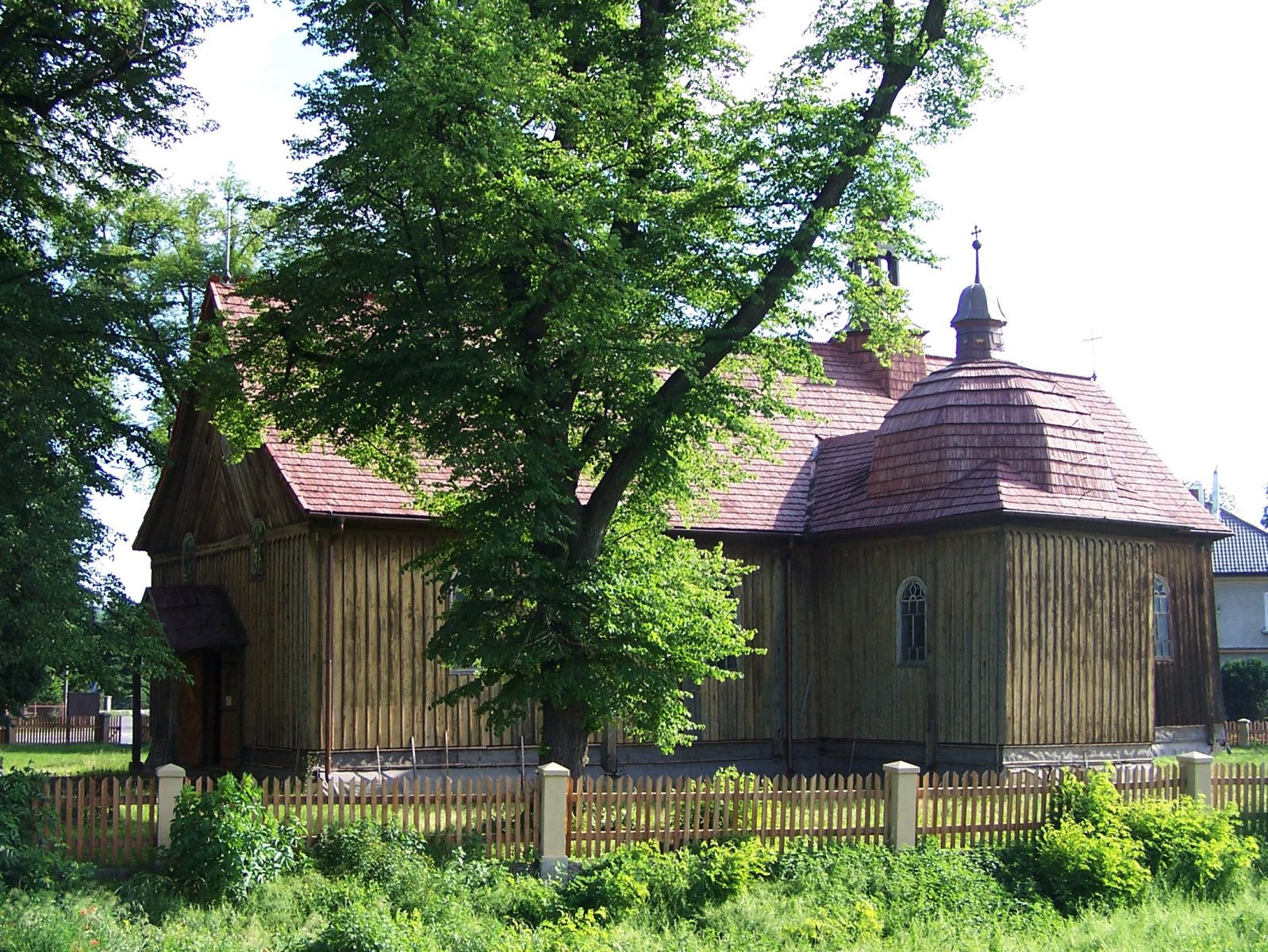 Łapanów. Stary Kościół